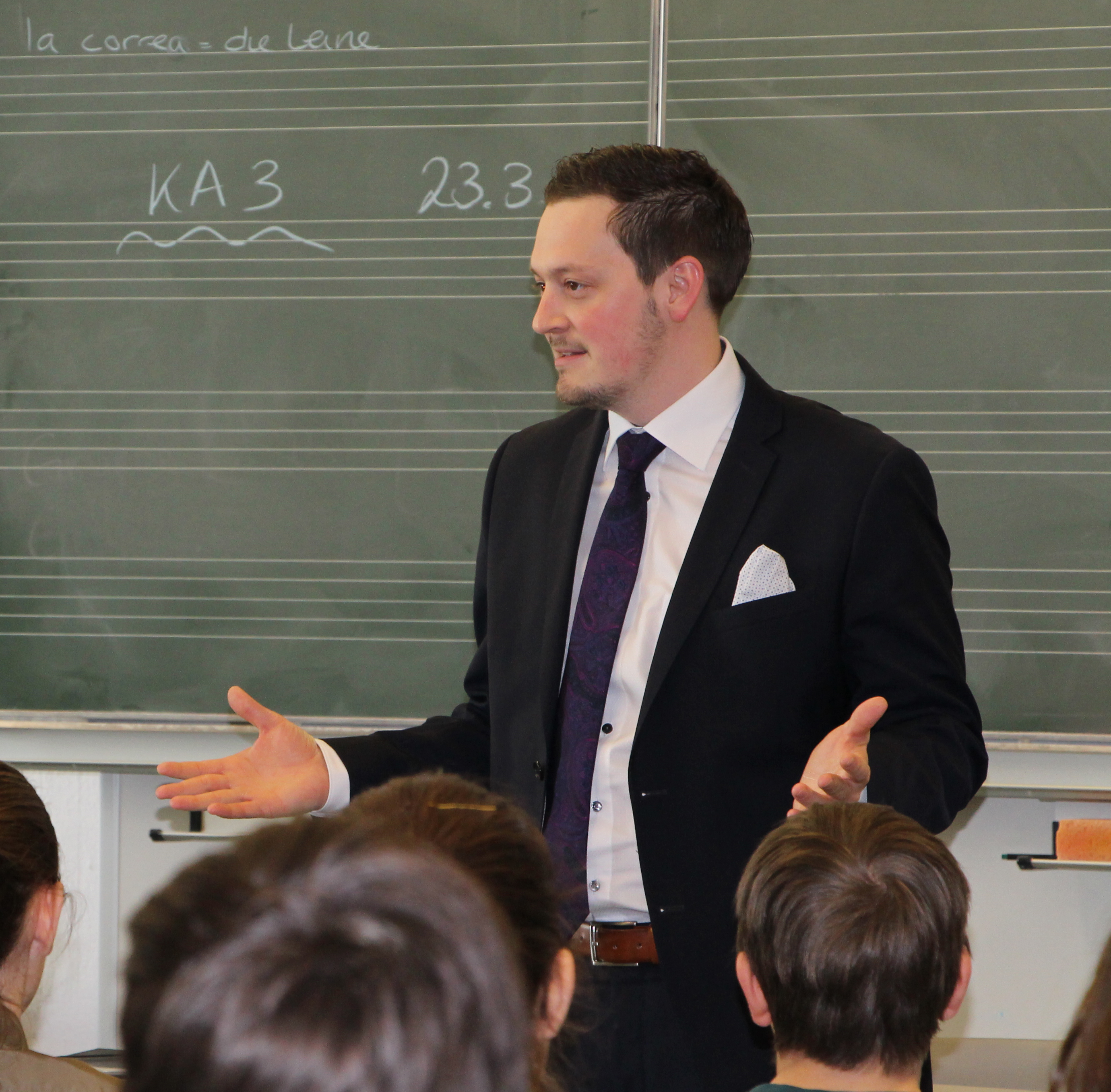 Stefan Herre, Landtag Baden-Württemberg